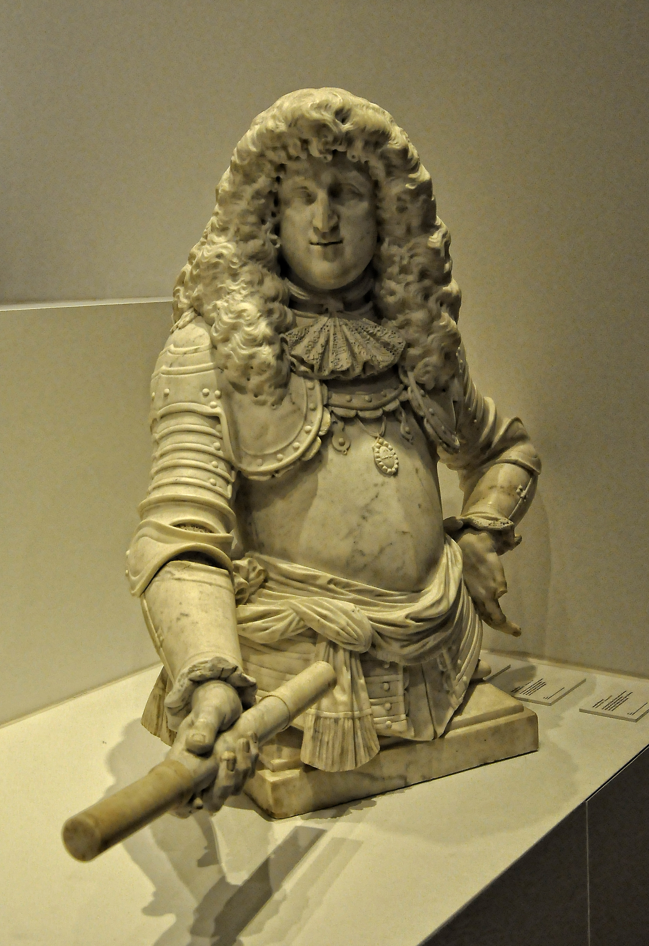 Lodewijk Willemsens (1630-1702) - Marmeren beeld van landvoogd Juan Domingo de Zuñiga y Fonseca - Museum aan de Stroom te Antwerpen